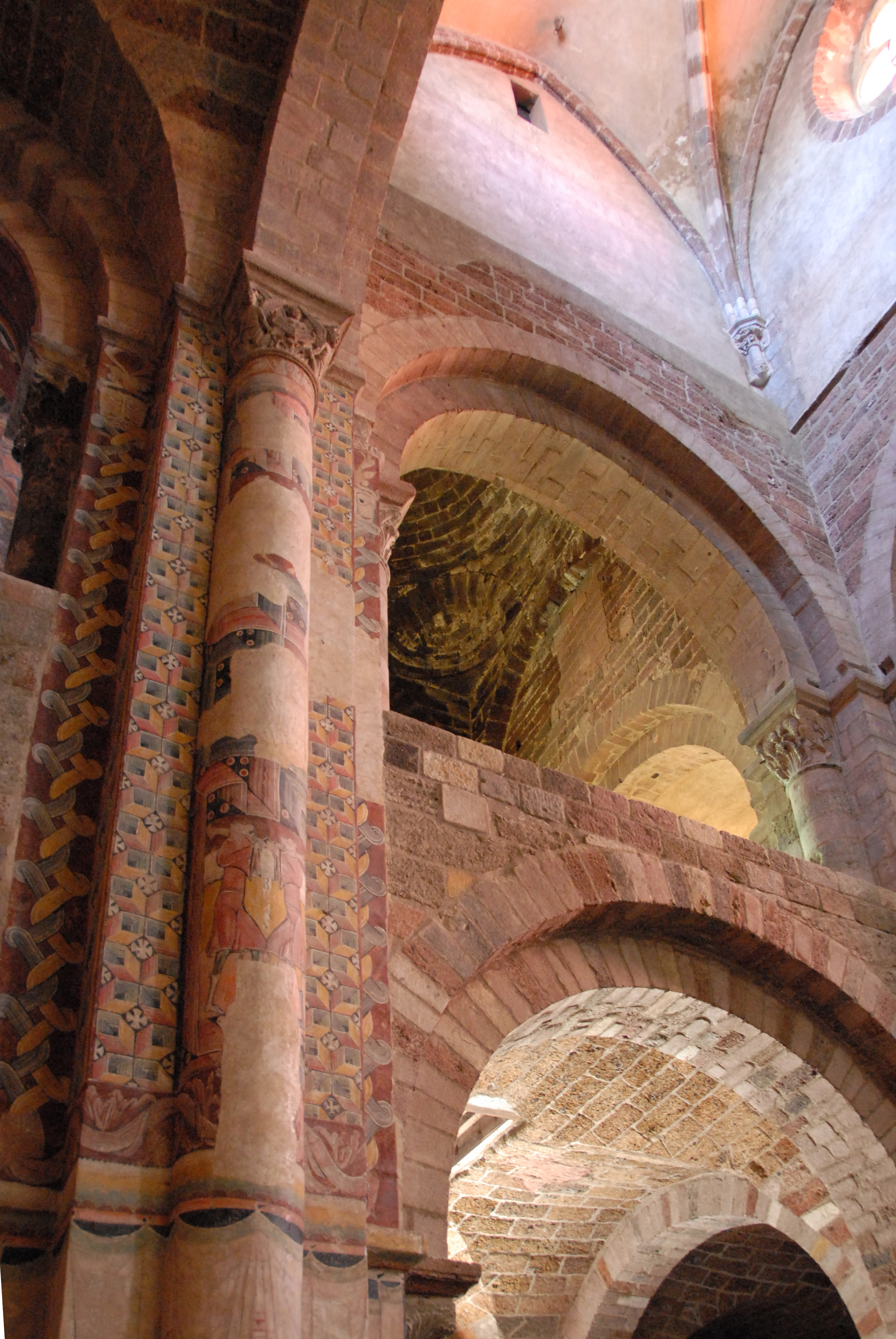 Saint-Julien Brioude, Mittlere Empore Narthex